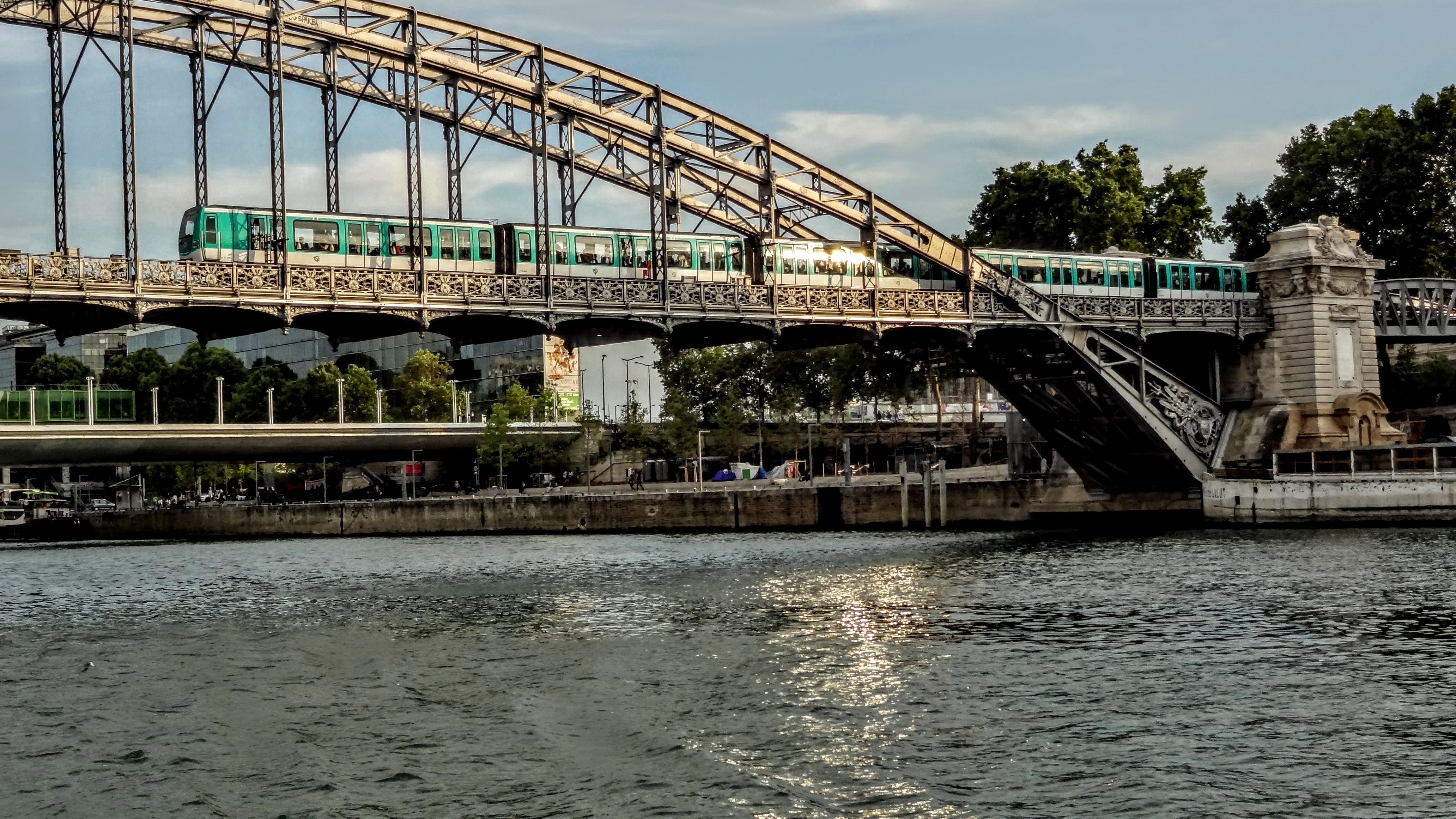 Viaduc d'Austerlitz .